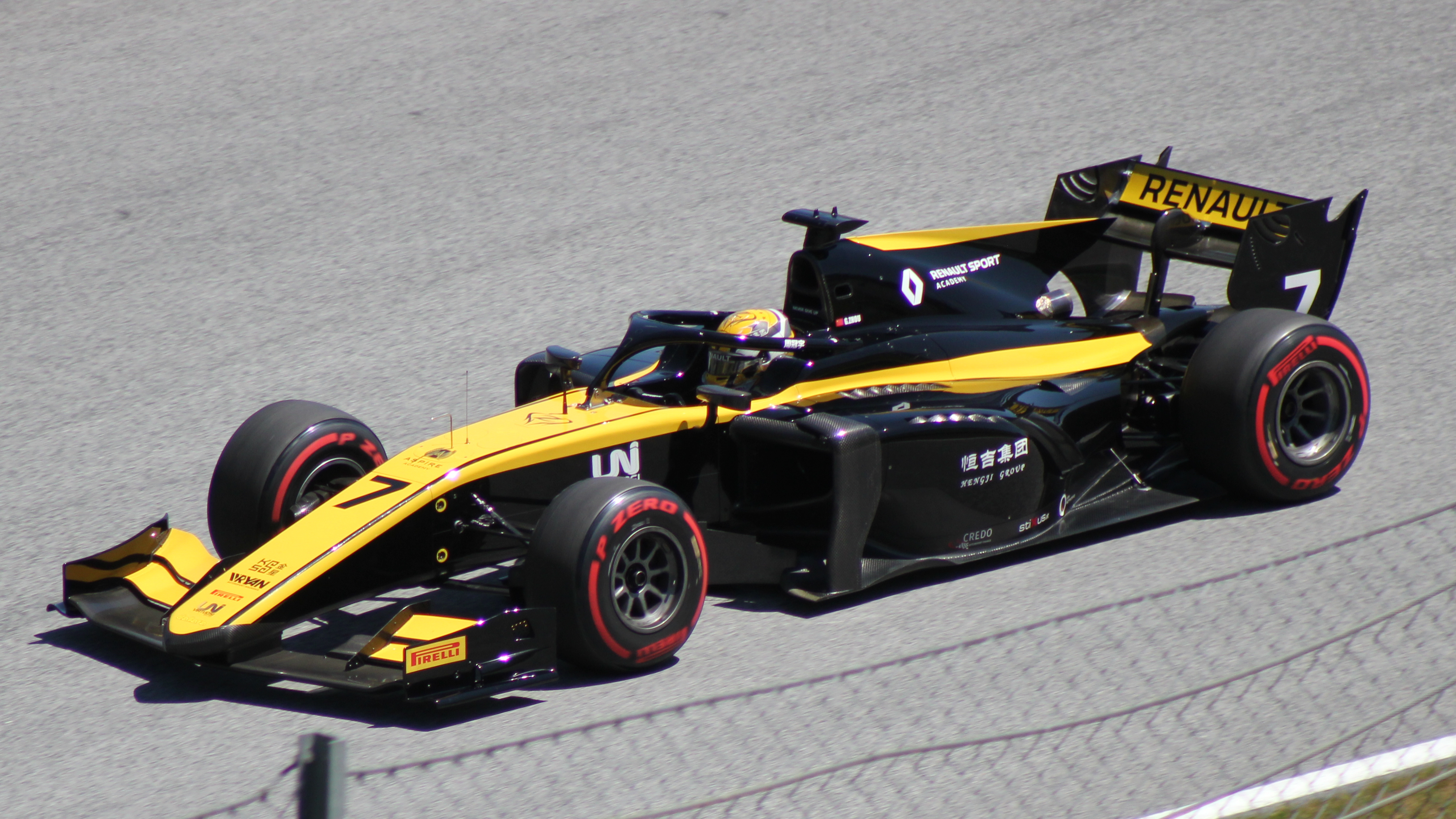 Zhou beim Rennwochenende in Österreich 2019